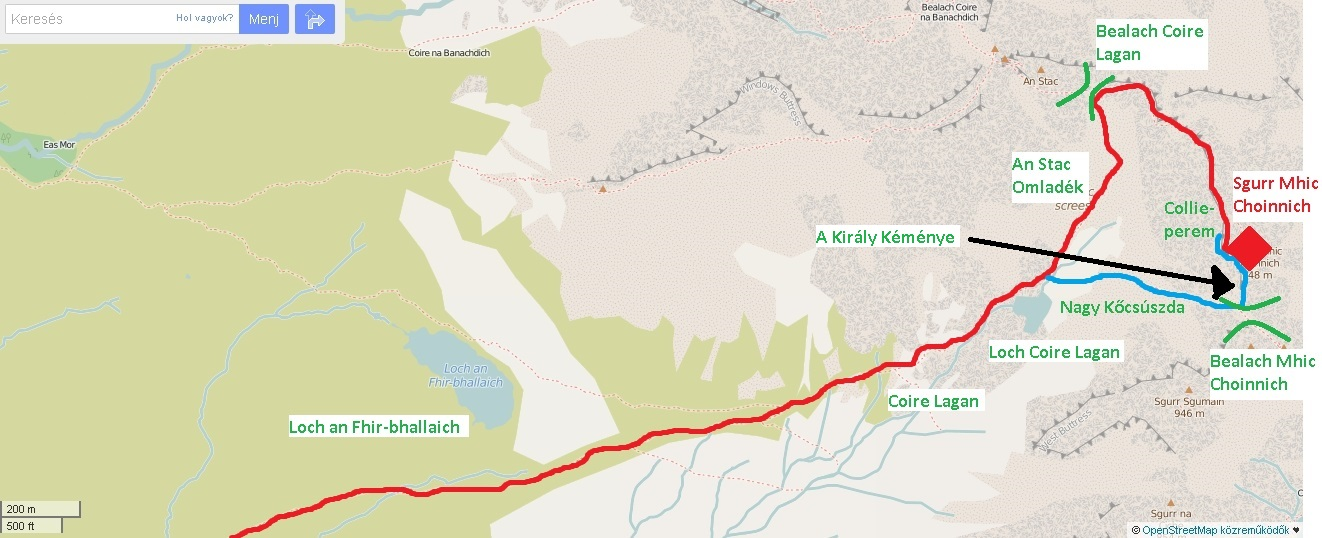 A Sgurr Mhic Choinnicra vezető turistaösvények.